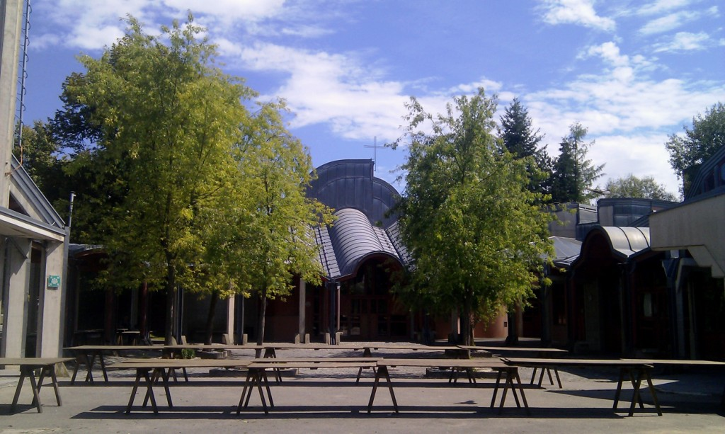 Innenhof mit Kirchengebäude der Bruder-Klaus-Kirche, Graz-Ragnitz